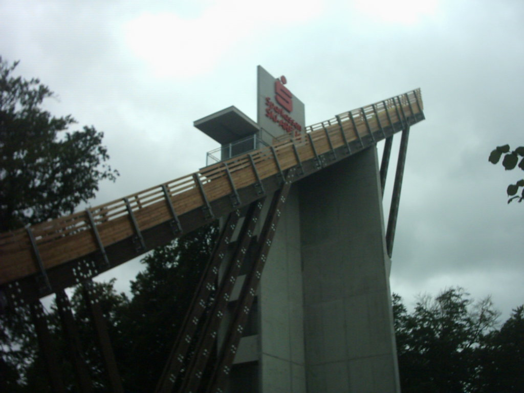 Schanze K66